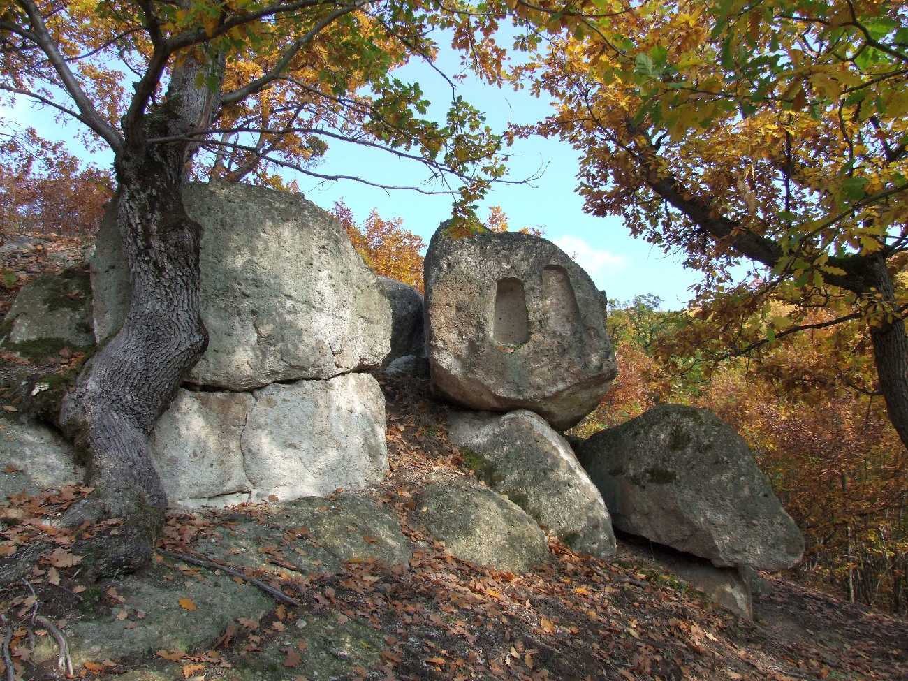 B4c, Cserépváralja, Köves-lápa